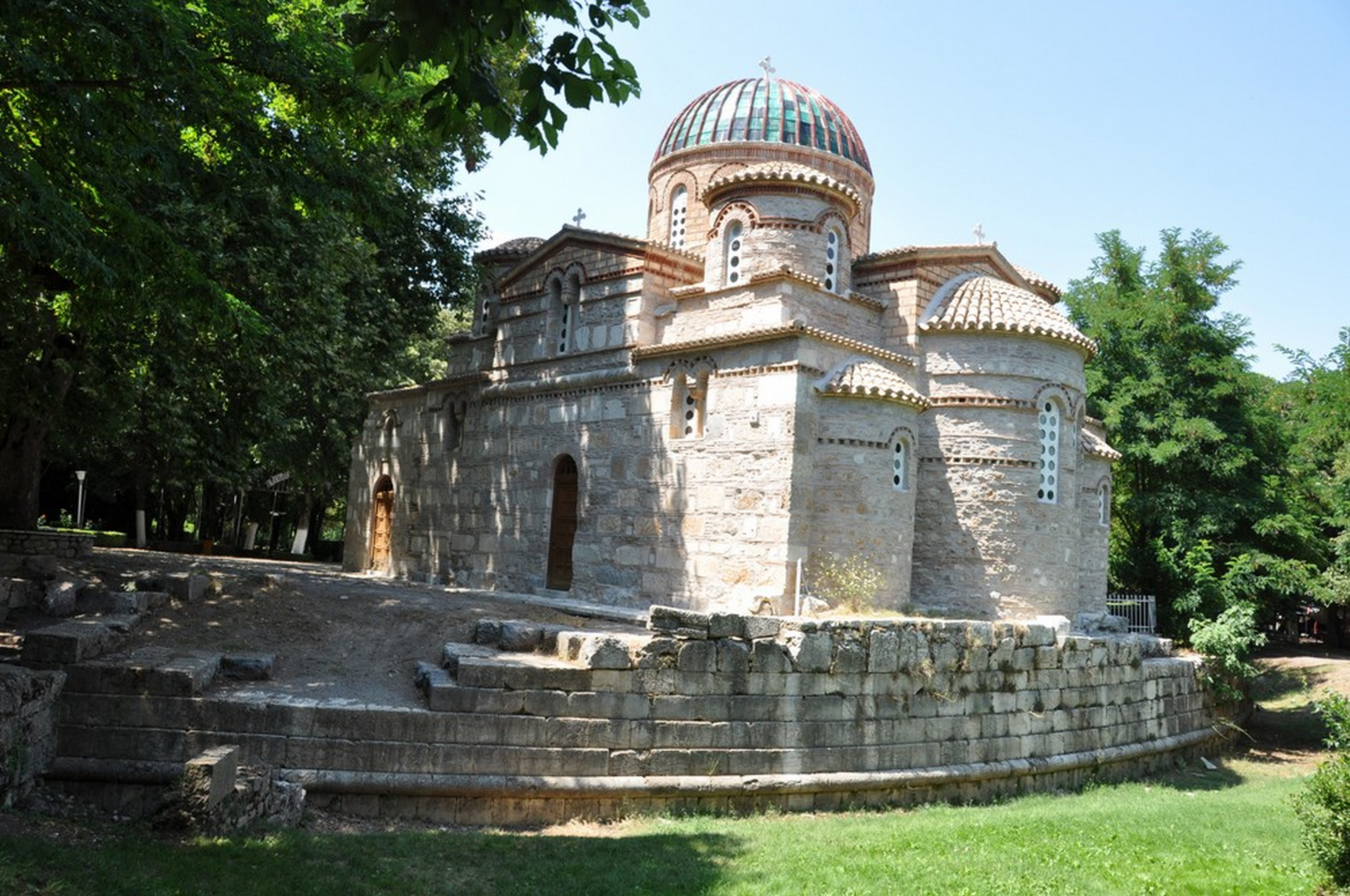 Ναός Επισκοπής Τεγέας